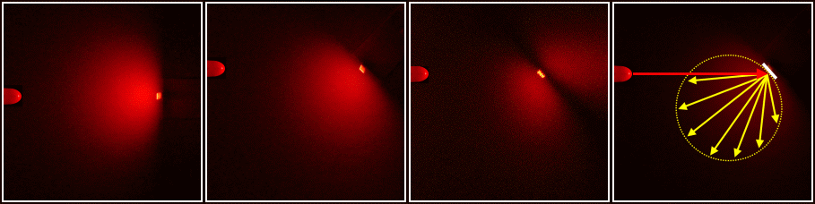 Ein dünner Papierstreifen als Lambertscher Strahler